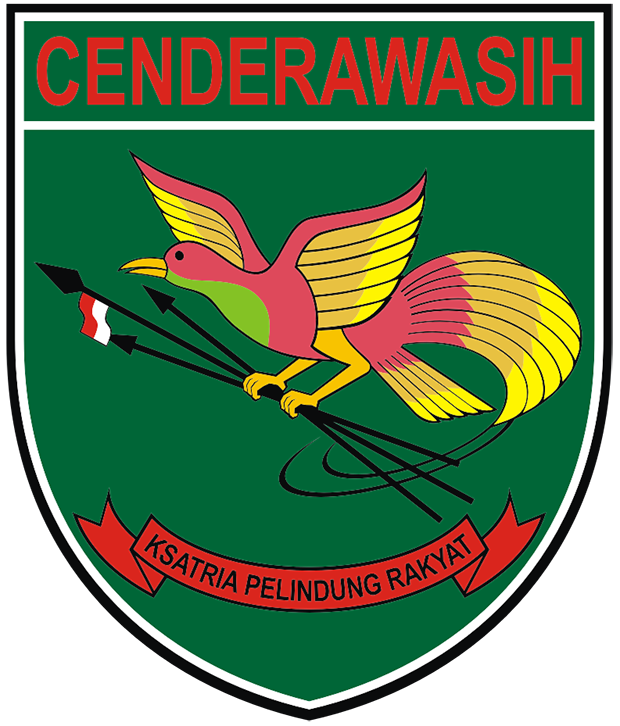 Gambar ini adalah Lambang Kodam XVII Cenderawasih